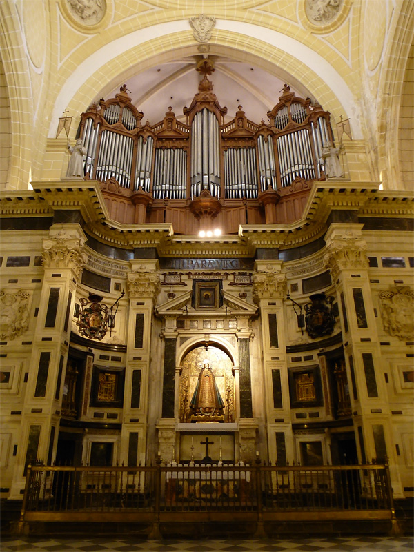 Catedral de Murcia, Región de Murcia, España.